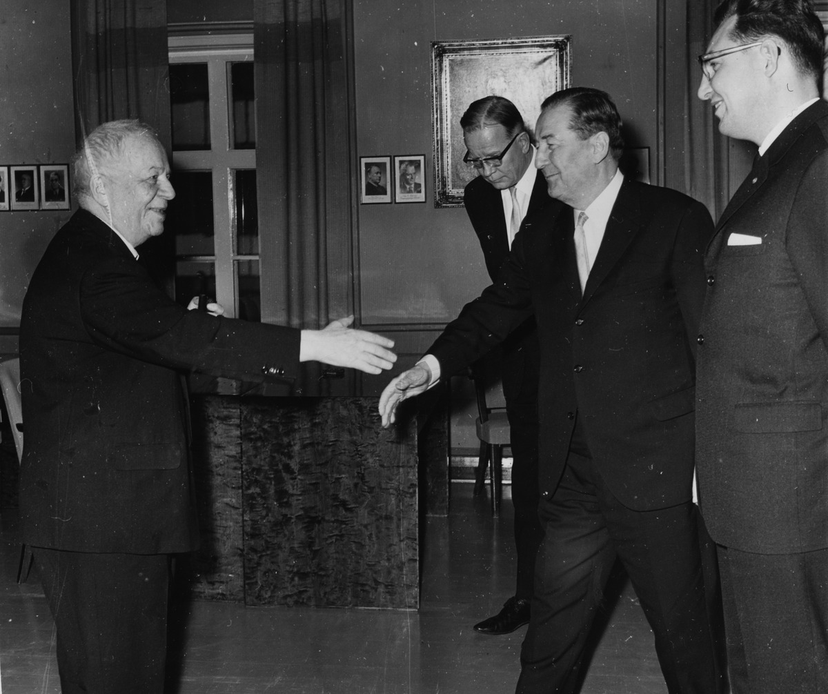 Professori Martti J. Mustakallio (vas.) tervehtii Valto Käkelää alueliitosjuhlassa; läsnä Lappeenrannan raatihuoneen valtuustosalissa myös pormestari Lauri Liira ja kaupunginjohtaja Jarmo Kölhi.